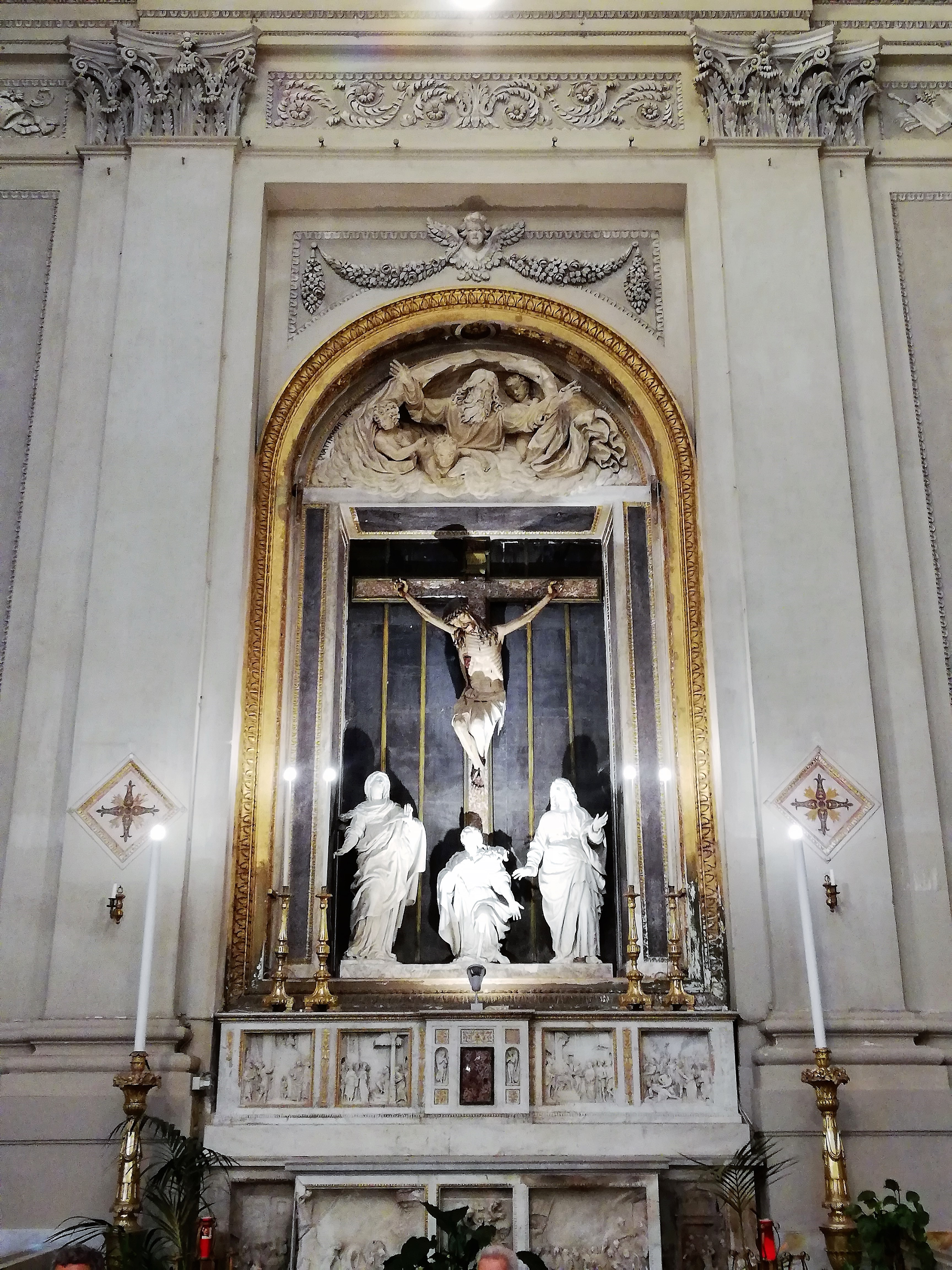 Cappella del Santissimo Crocifisso. Parete braccio transetto sinistro.